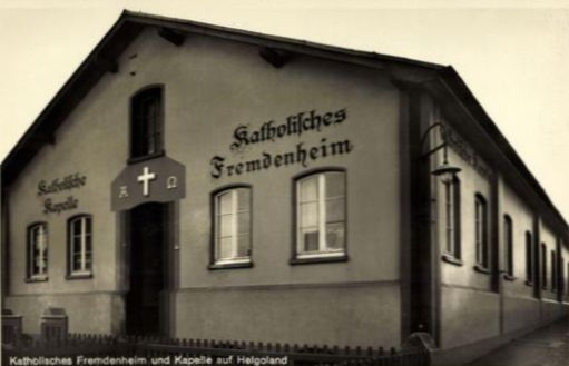 Im 1. Weltkrieg wurde für die katholischen Soldaten der Marine auf Helgoland diese Kapelle auf dem Oberland gebaut, nach dem 1. Weltkrieg wurde sie auch zum Fremdenheim